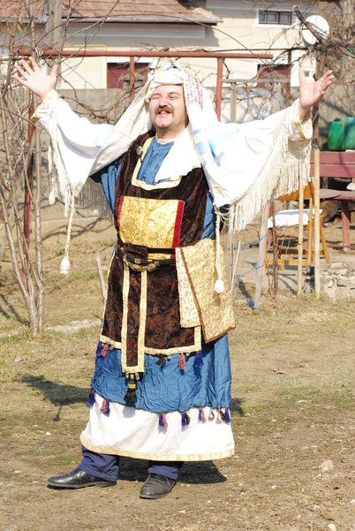 OBedeya Dorin David Ben Aharon Cohen ,în haine de cohen